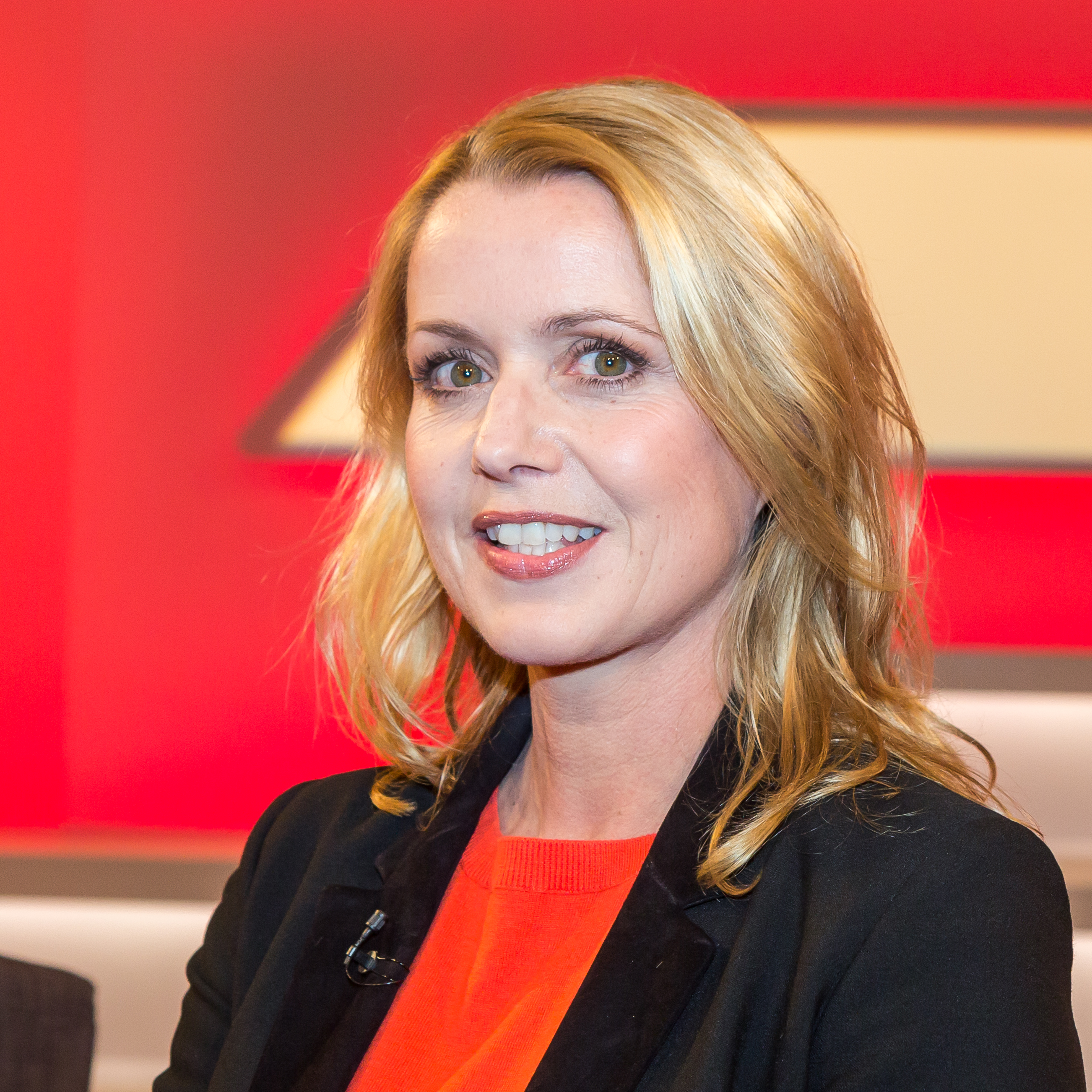 Maischberger, Sendung vom 13. Dezember 2017. Thema der Sendung: „Panikjahr 2017: Besser als befürchtet?“ Foto: Astrid Frohloff